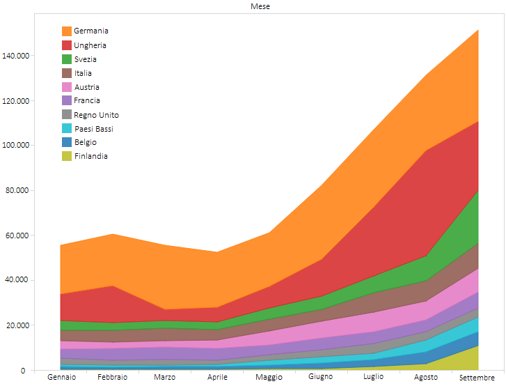 Numero di richieste di asilo arrivate ai 10 paesi con più richieste fra quelli dell'UE nel periodo fra gennaio e settembre 2015.